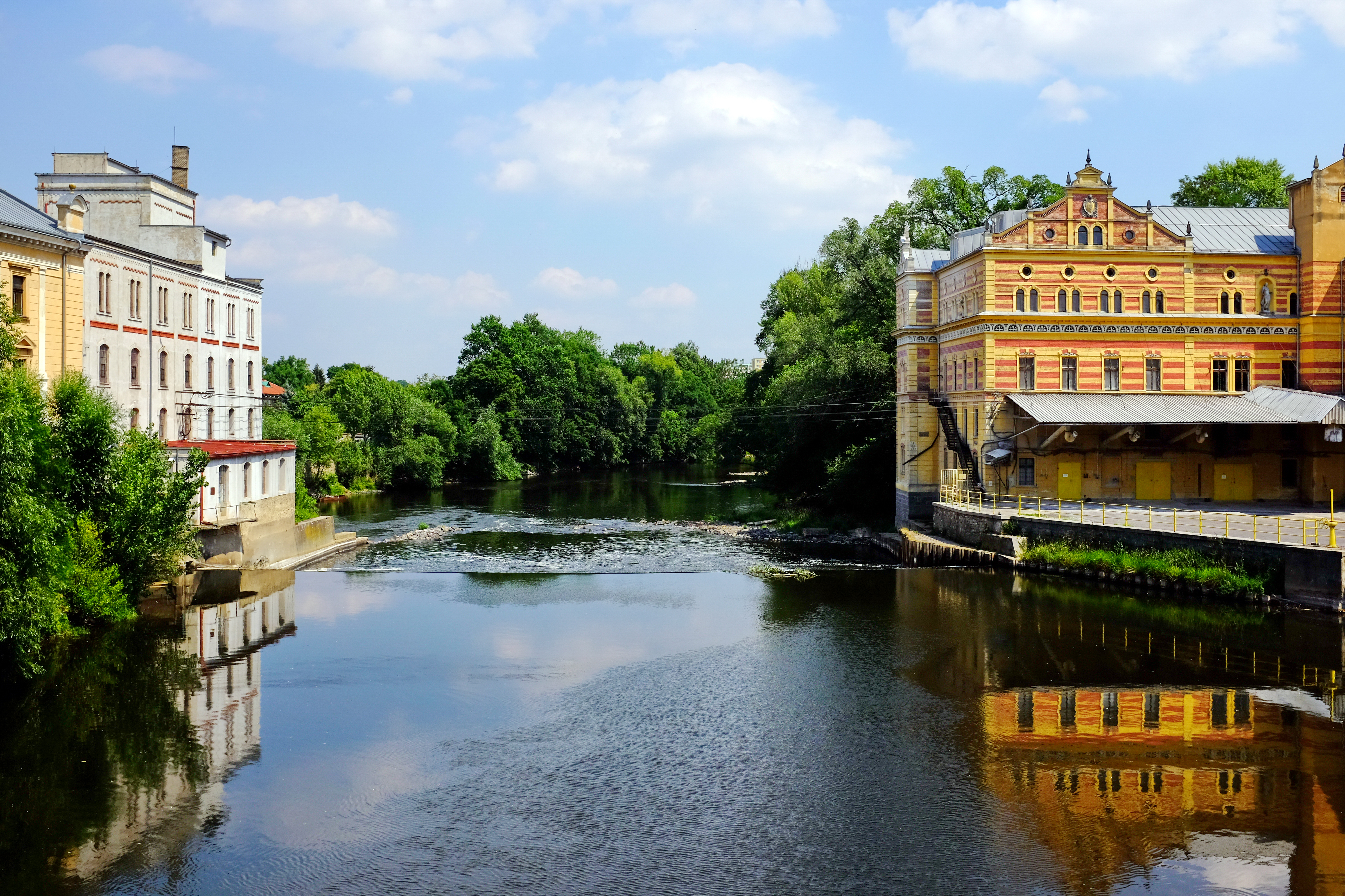 Louny, Jiráskovo mlýny na Ohři